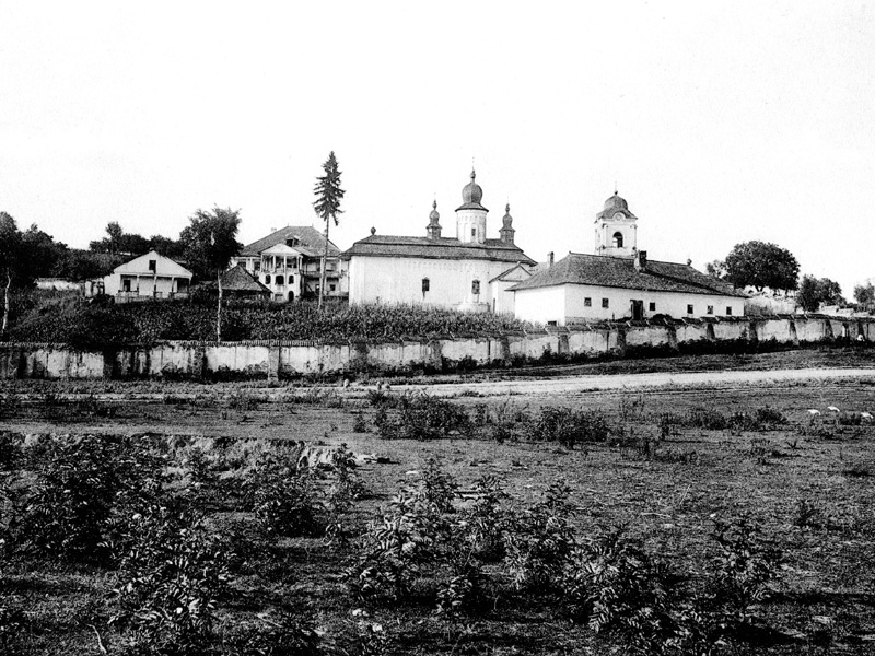 Căciula Monastery, Botoşani County